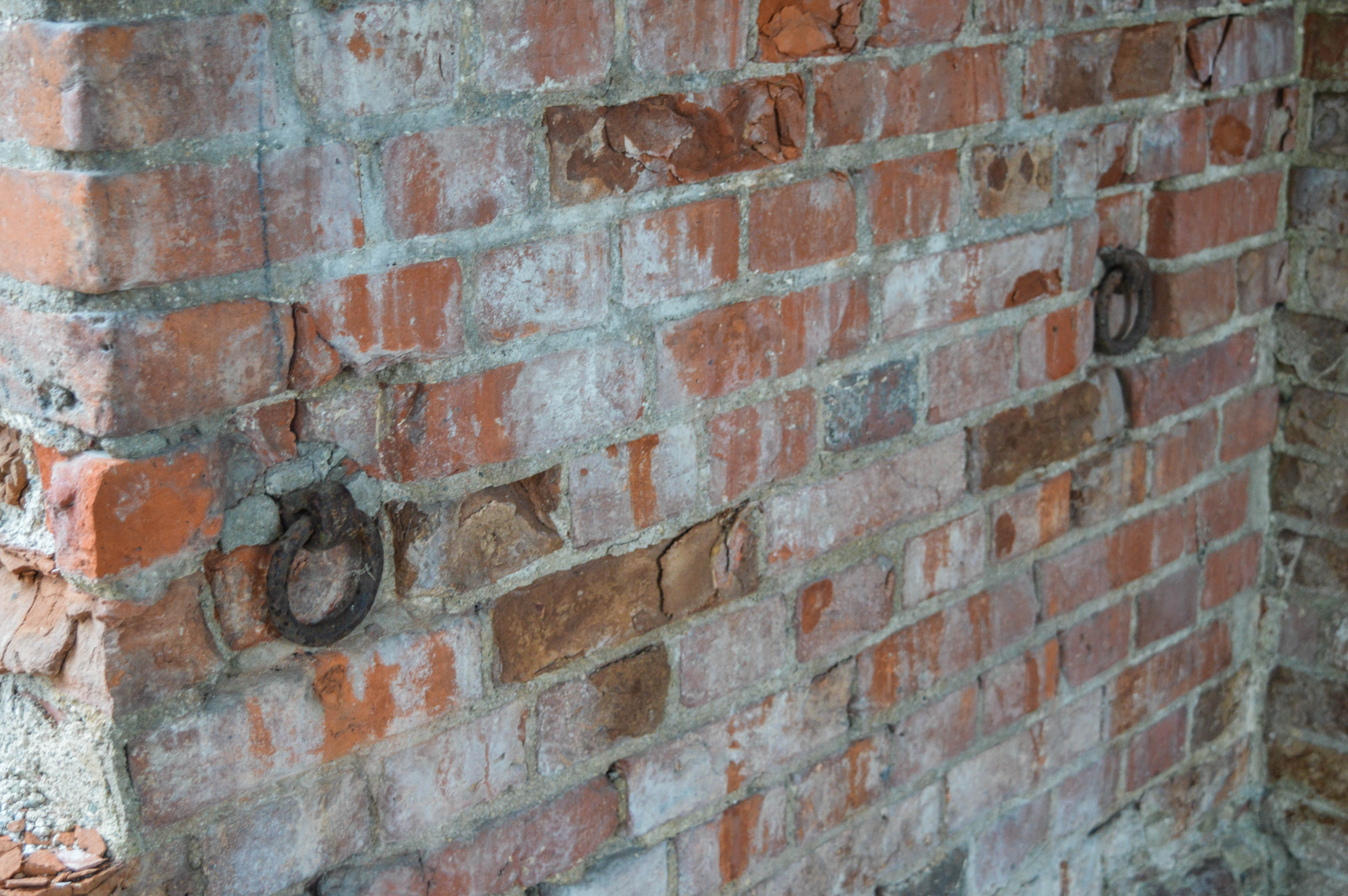 Коновязь в одной из усадеб Кёнигсберга